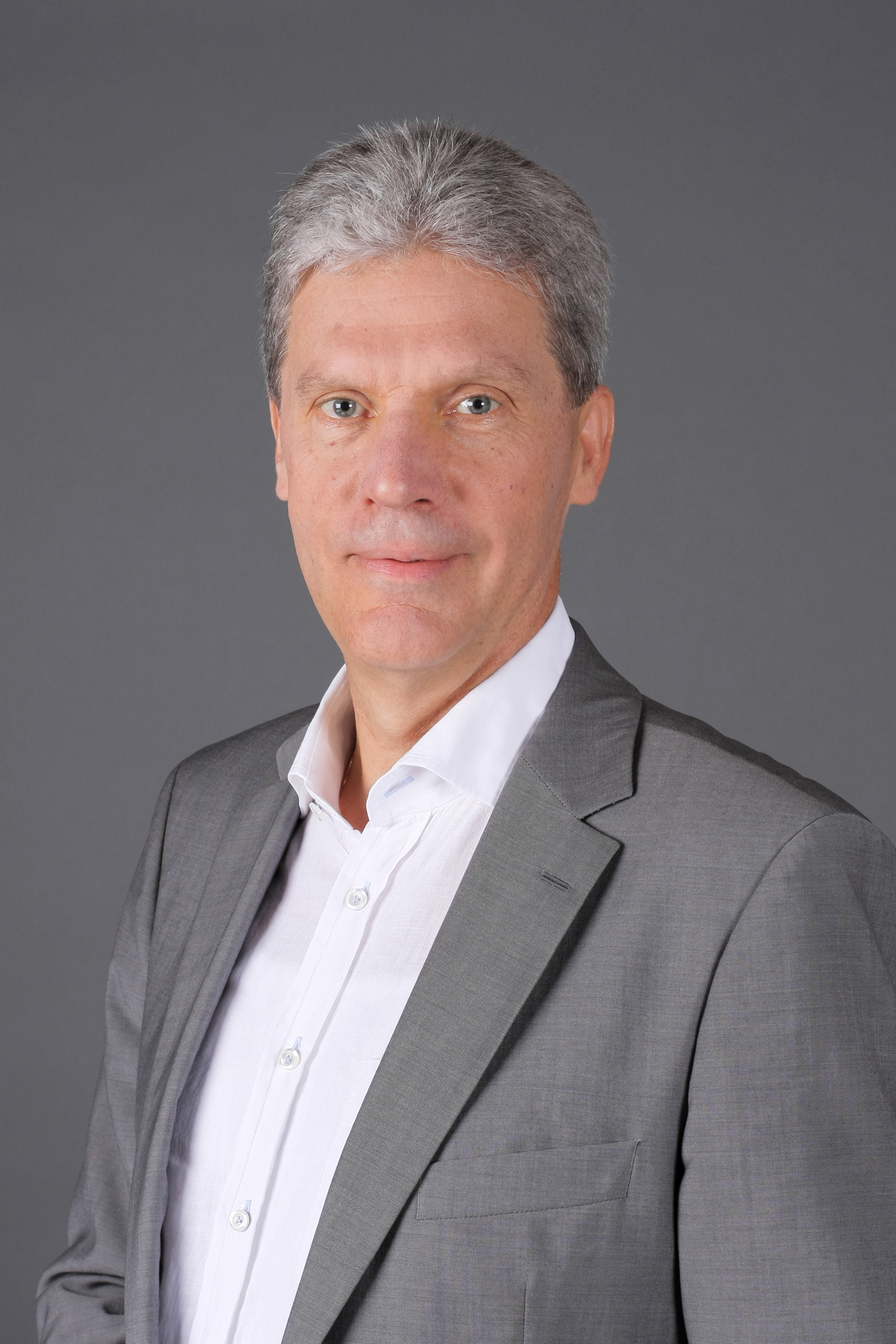 Helmut Holter, MdL Mecklenburg-Vorpommern, Fraktionsvorsitzender Die Linke